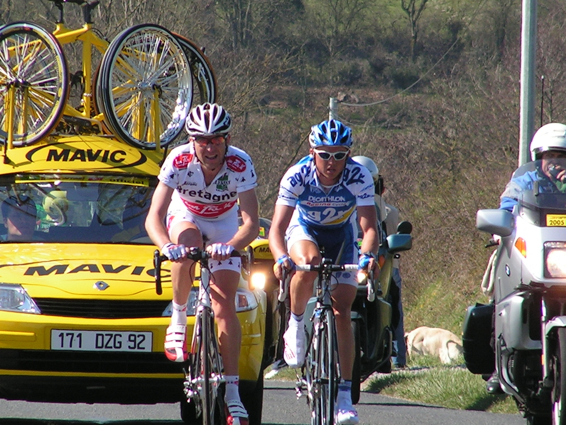 Photo prise dans la côte du jeu lors de cholet pays de la loire 2005. Noan Lelarge (Bretagne Jean Floc'h) à gauche et Simon Gerrans (AG2R) à droite (Photo personnelle)